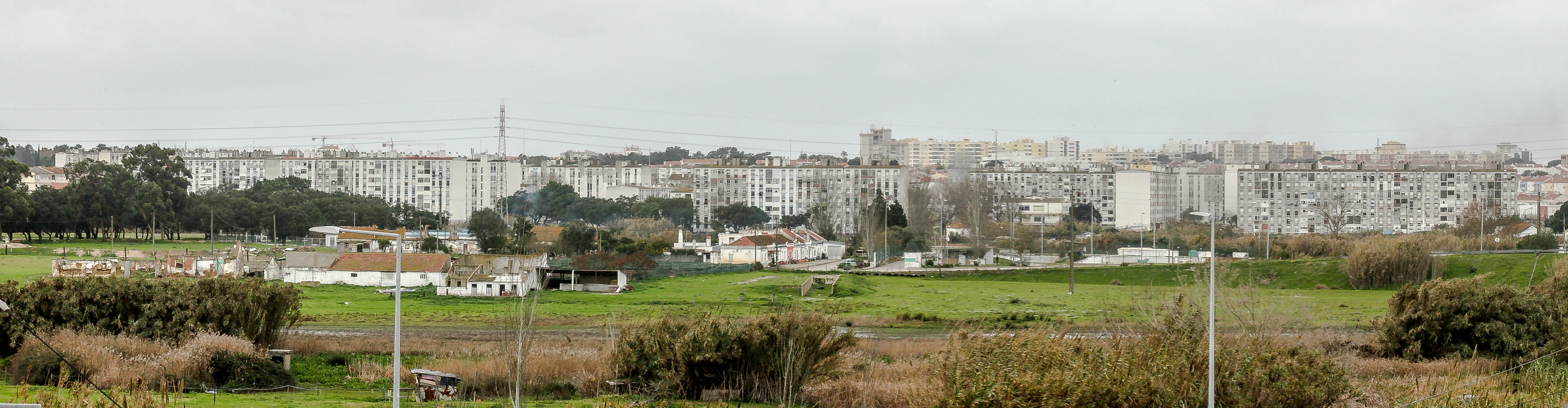 Panorama da localidade de Vale da Amoreira, vista da vila de Alhos Vedros.